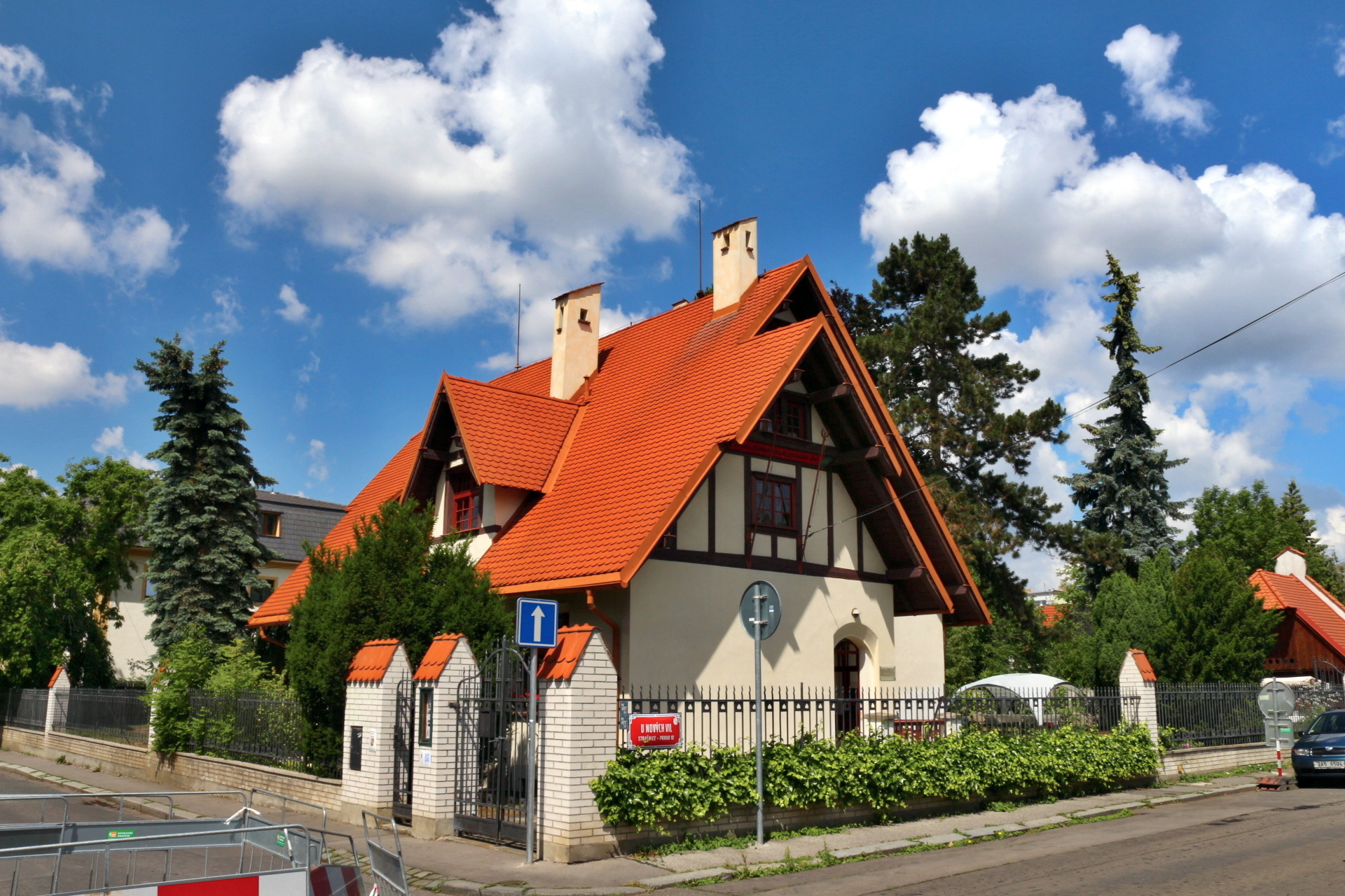 Trmalova vila, Praha Strašnice